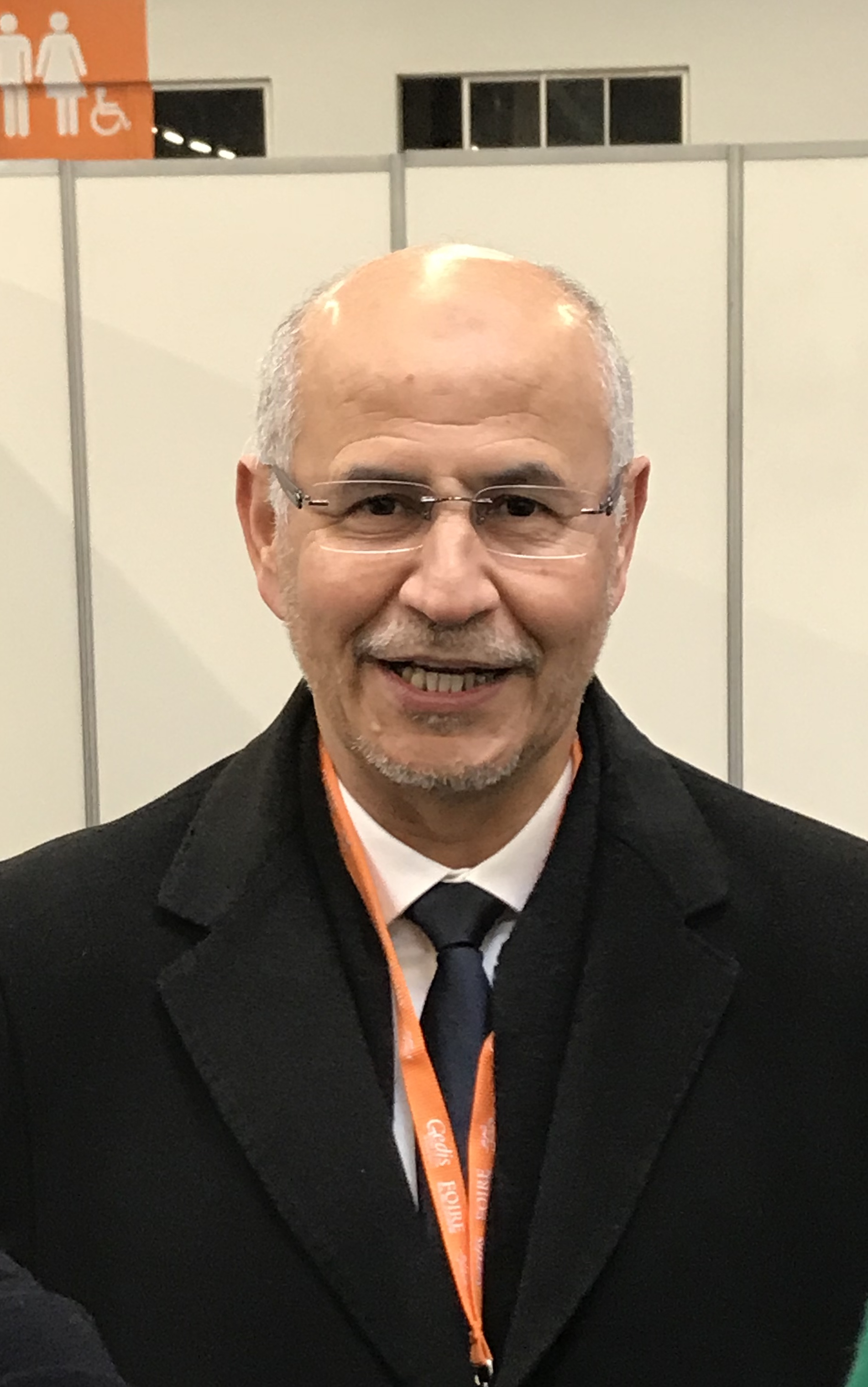 Amar Lasfar, président de Musulmans de France, pendant la Rencontre Annuelle des Musulmans de France, Paris le 1er avril 2018.